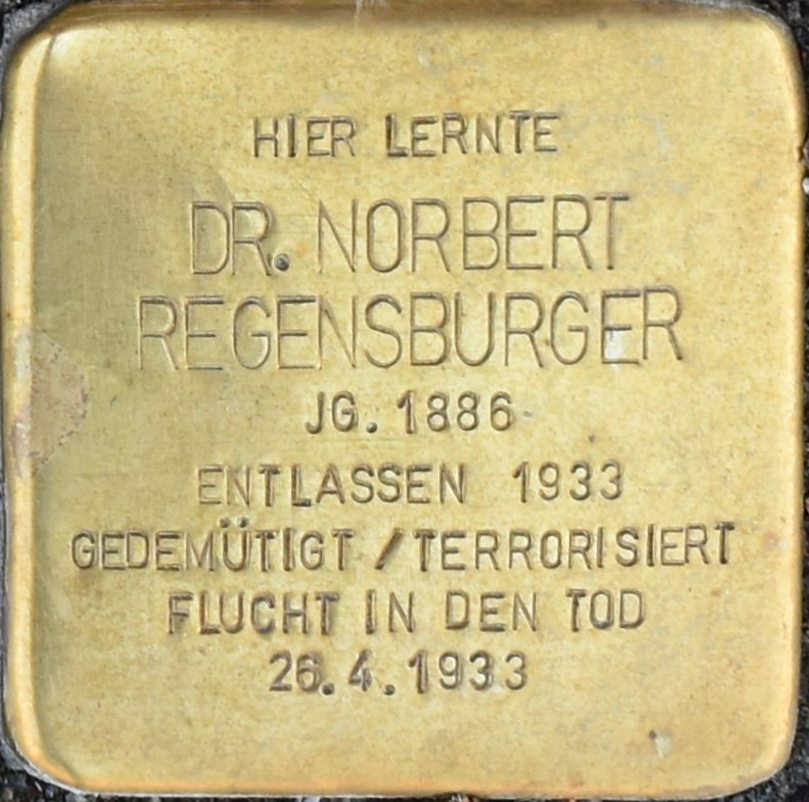 Braunschweig Leonhardstraße 63 Stolperstein Norbert Regensburger.